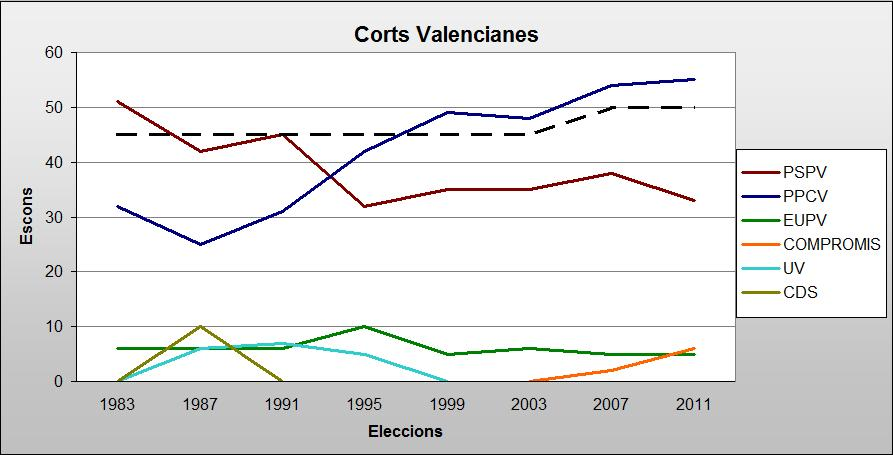 Comp.pais_valencià.JPG